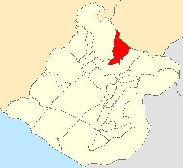 Mapa distrito Susapaya,Tacna - Perú